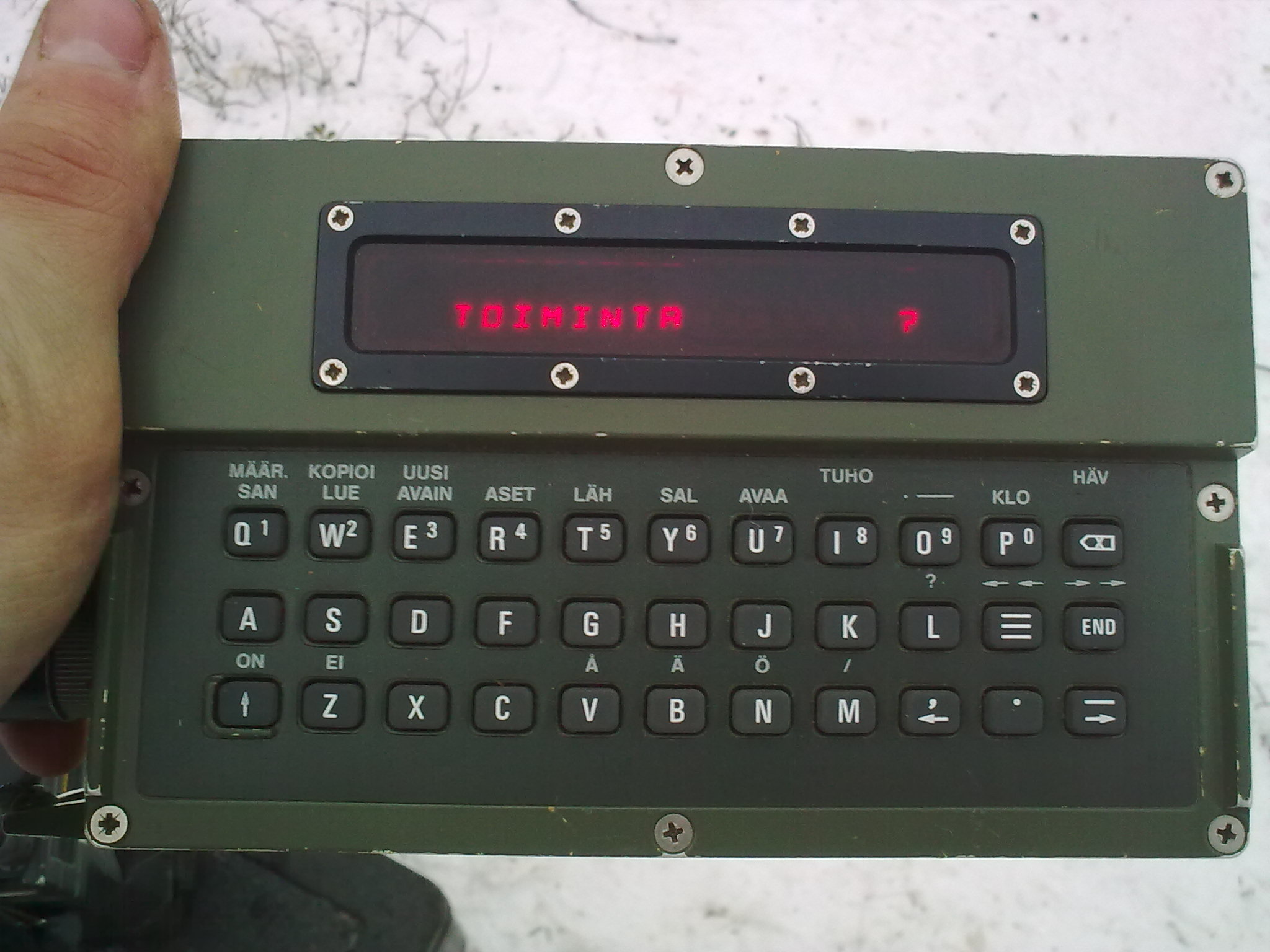 Partiosanomalaite